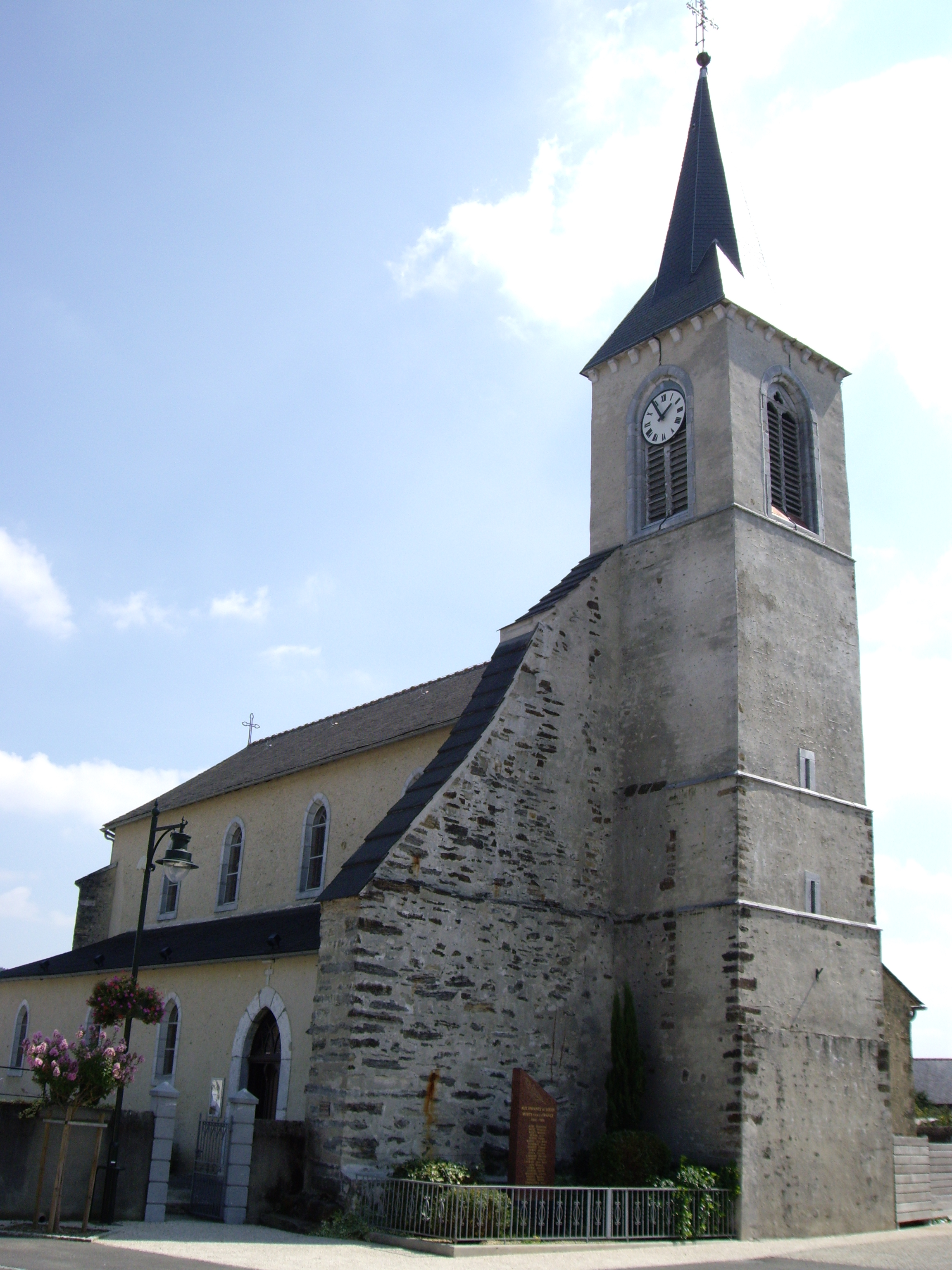 église Saint-Saturnin de Louey (65)